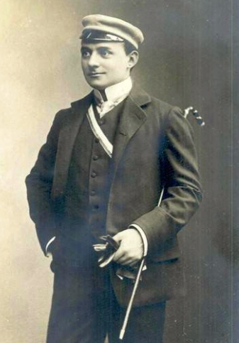 Der Schauspieler Harry Walden in der Rolle des Studenten Prinz Karl heinrich im Schauspiel Alt-Heidelberg